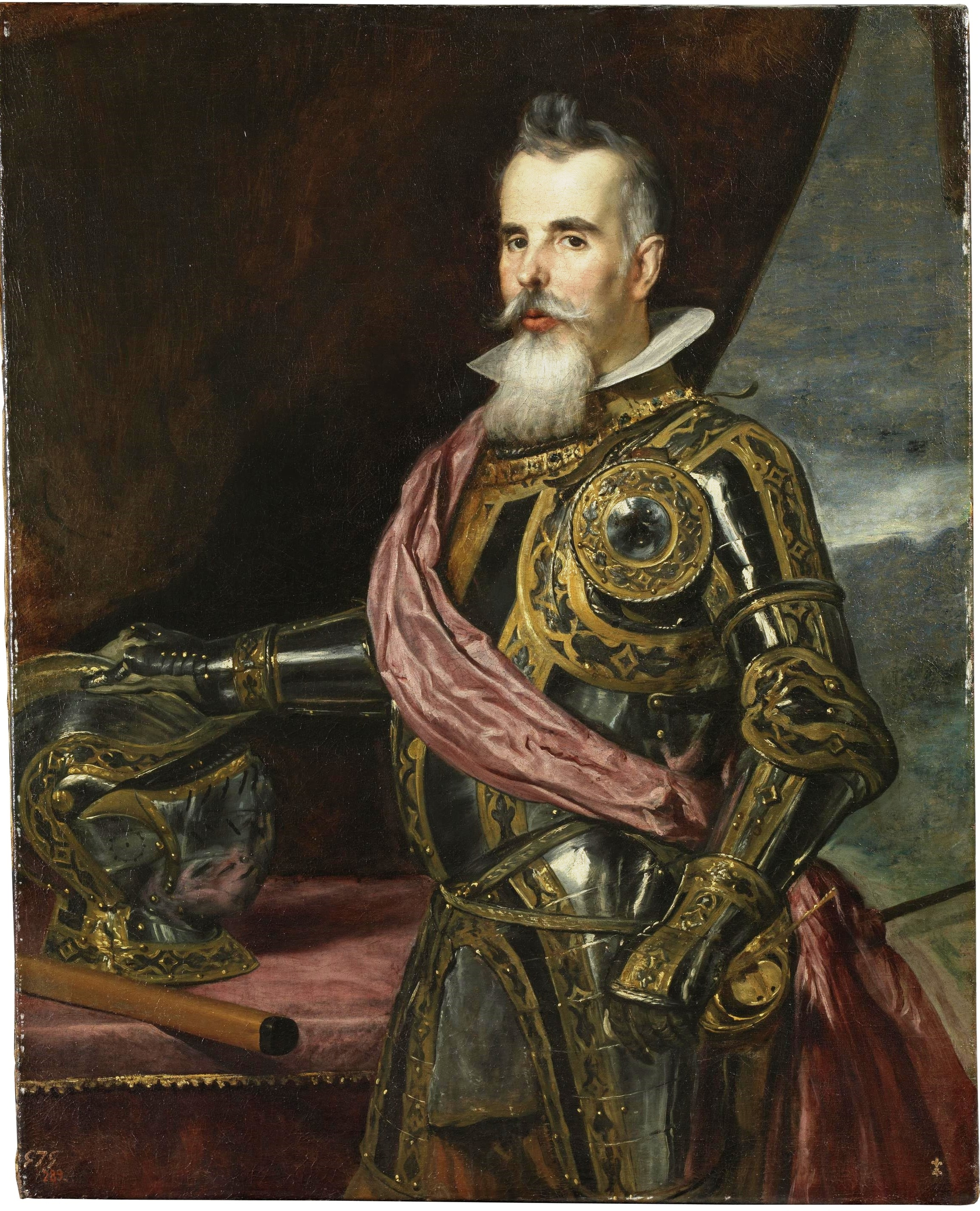 Retrato del aristócrata español Juan Francisco de Pimentel (1584-1652), X conde y VII duque de Benavente y también conde de Mayorga y de Luna. El retratado aparece de más de medio cuerpo, revestido con una armadura y acompañado por numerosas insignias, como el fajín rojo y la bengala, que demuestran el alto rango que ostentaba en el ejército español, así como el collar de la Orden del Toisón de Oro, de la que era caballero. La mayoría de los autores dan por cierto que Velázquez pintó este retrato, aunque algunos han puesto en duda esa afirmación.